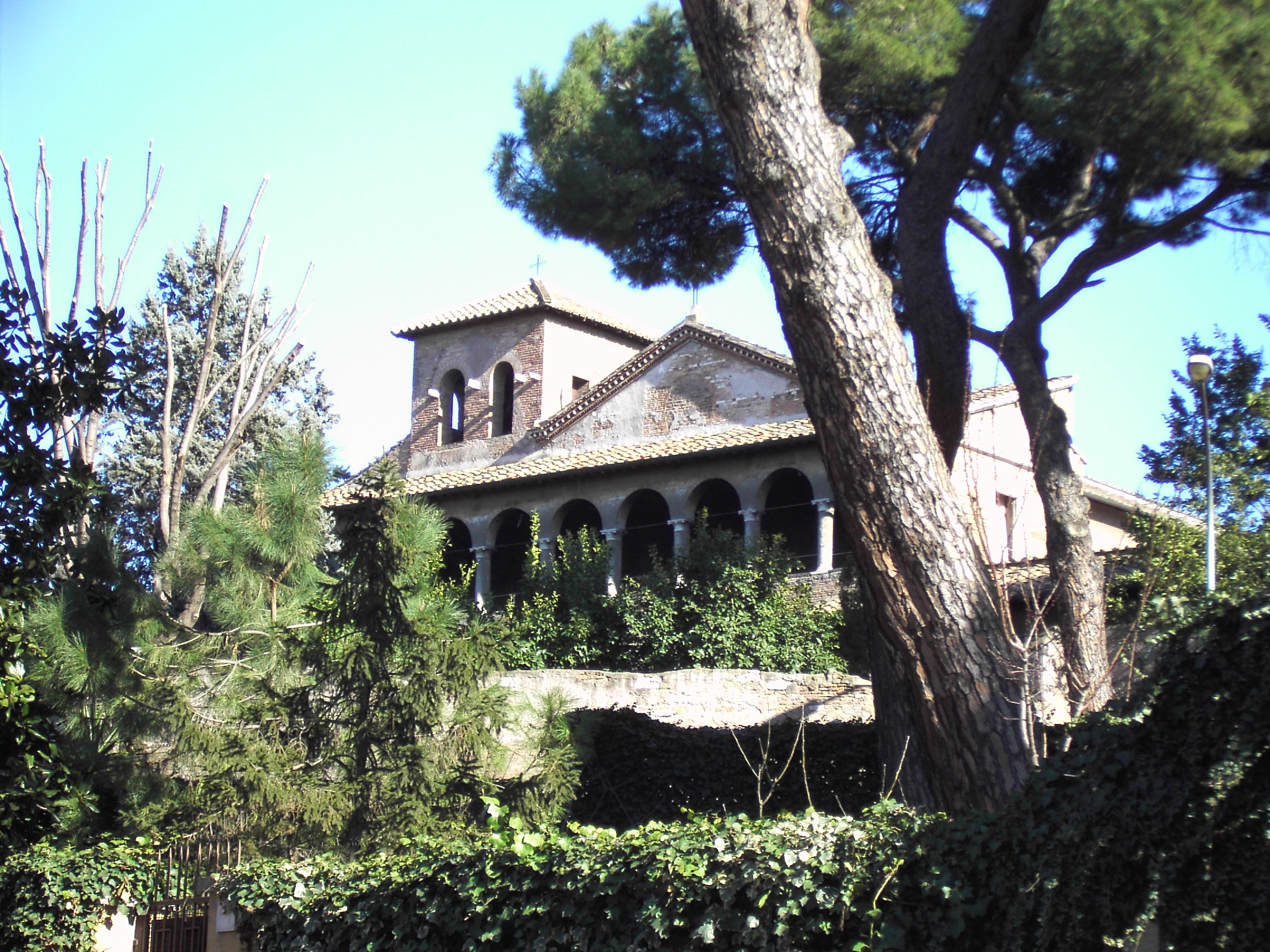 Roma, chiesa di San Saba, loggiato e campanile che emergono dal muro di cinta